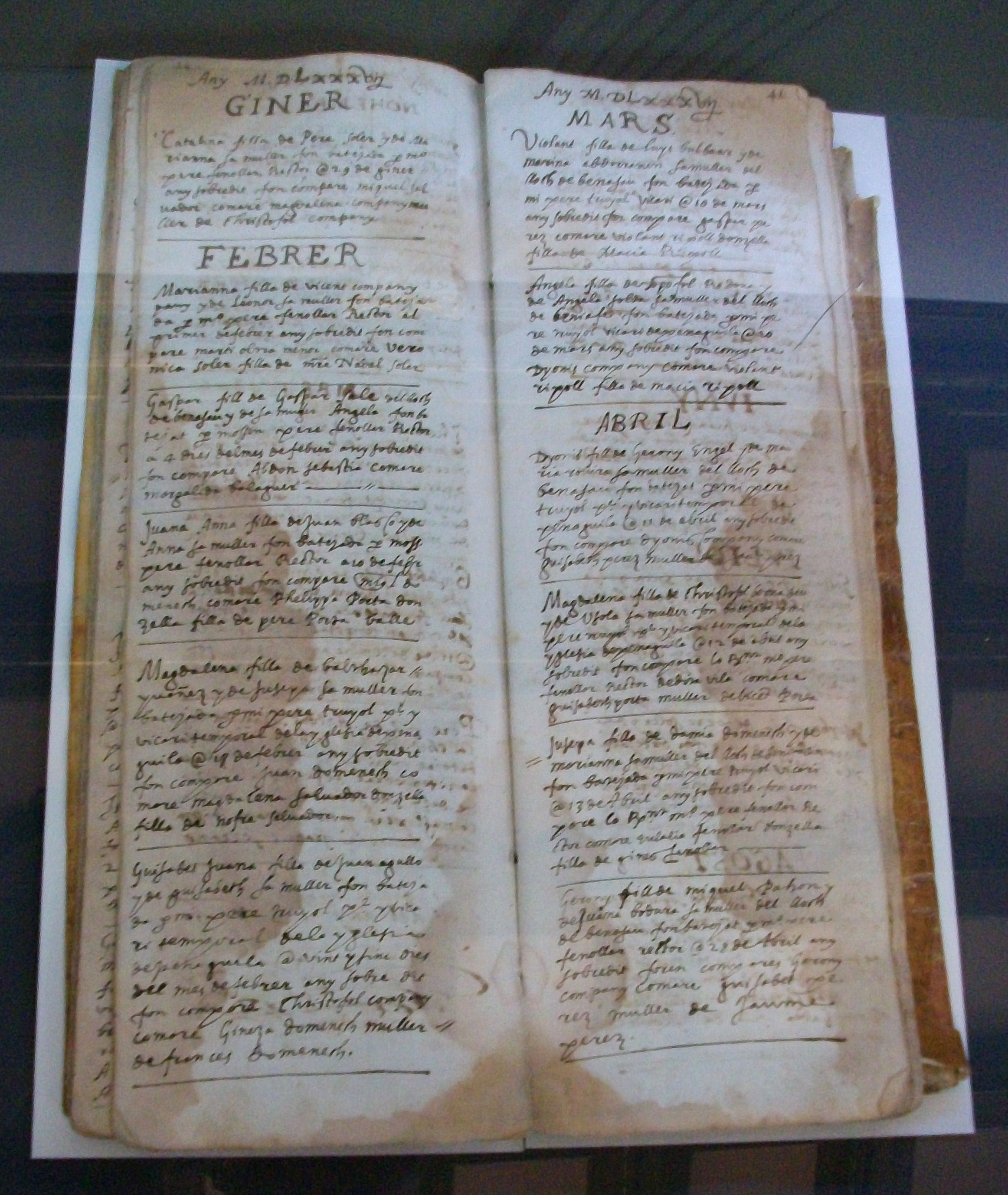 Primer llibre de baptismes de l'església de l'Assumpció de la Mare de Déu de Penàguila, 1570-1590. Cob. perg. 85 f. (420 x 145 mm) Línia tirada. Entre 25 i 65 línies per pàgina, cinc llibres, Arxiu parroquial de l'Assumpció de la Mare de Déu de Penàguila.